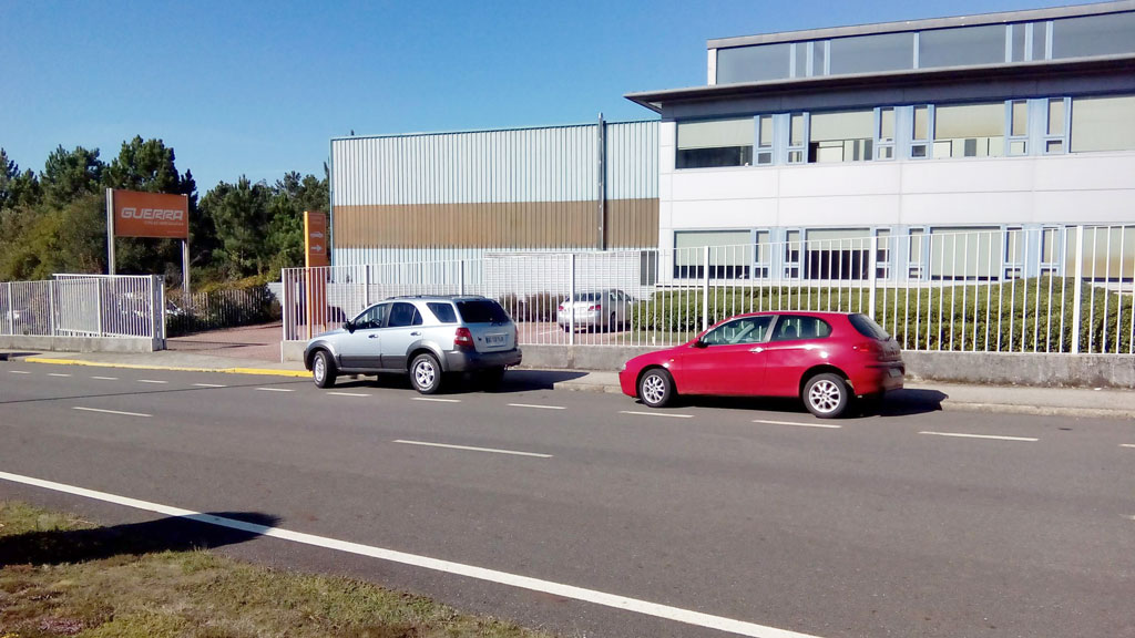 Guerra, Vila de Cruces.